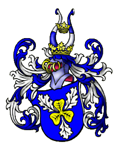 Wappen der von Bismarck